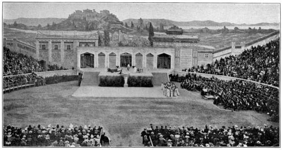 Ilustraciones libro de Memorias Saint-Saëns, 1919